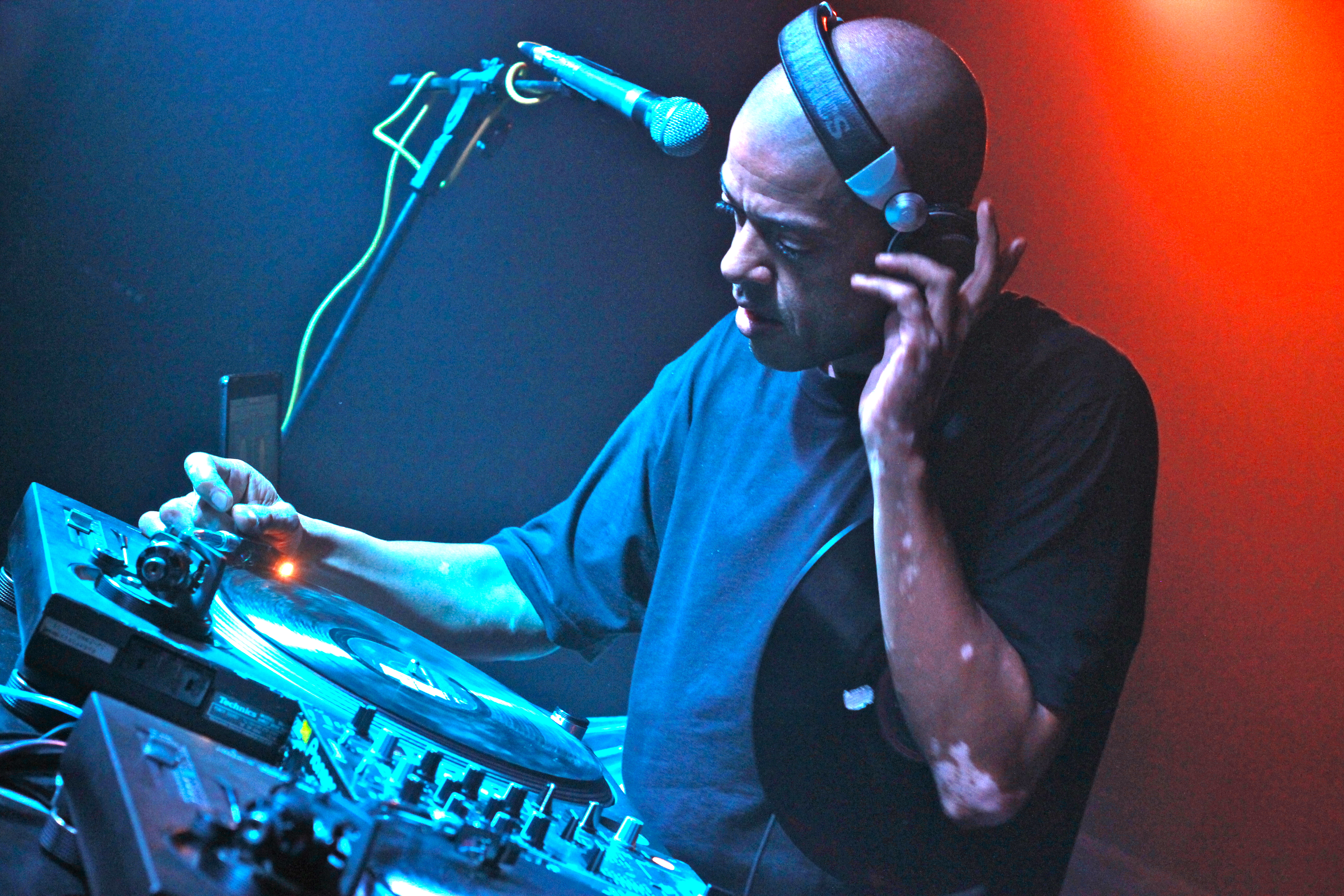 Dj KL Jay em apresentação no Jack Music Pub (CC BY-SA) Fora Do Eixo